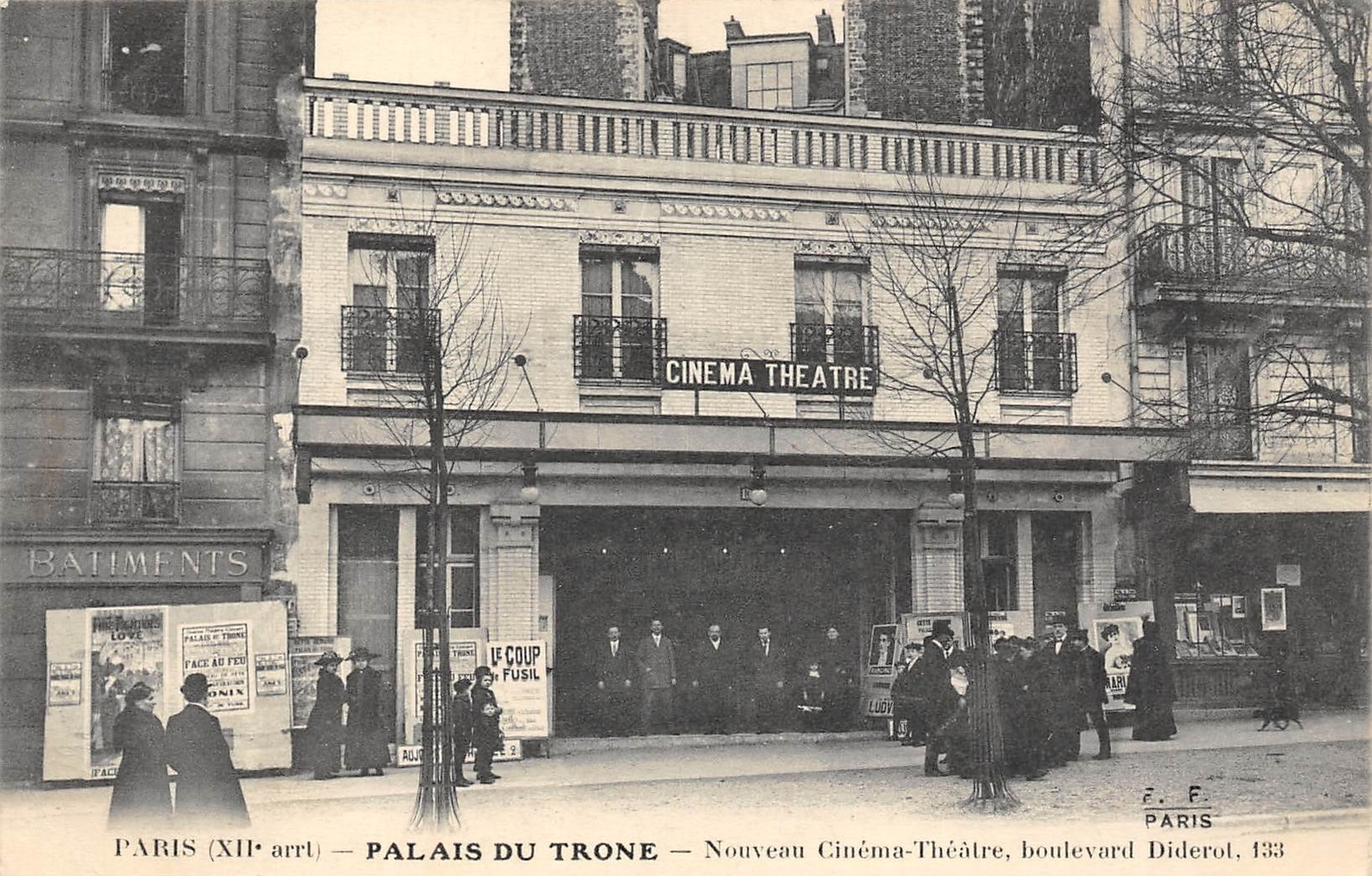 "Palais du Trone, nouveau Cinéma-Théâtre, boulevard Diderot 133", Paris; Édition F. Fleury, Paris